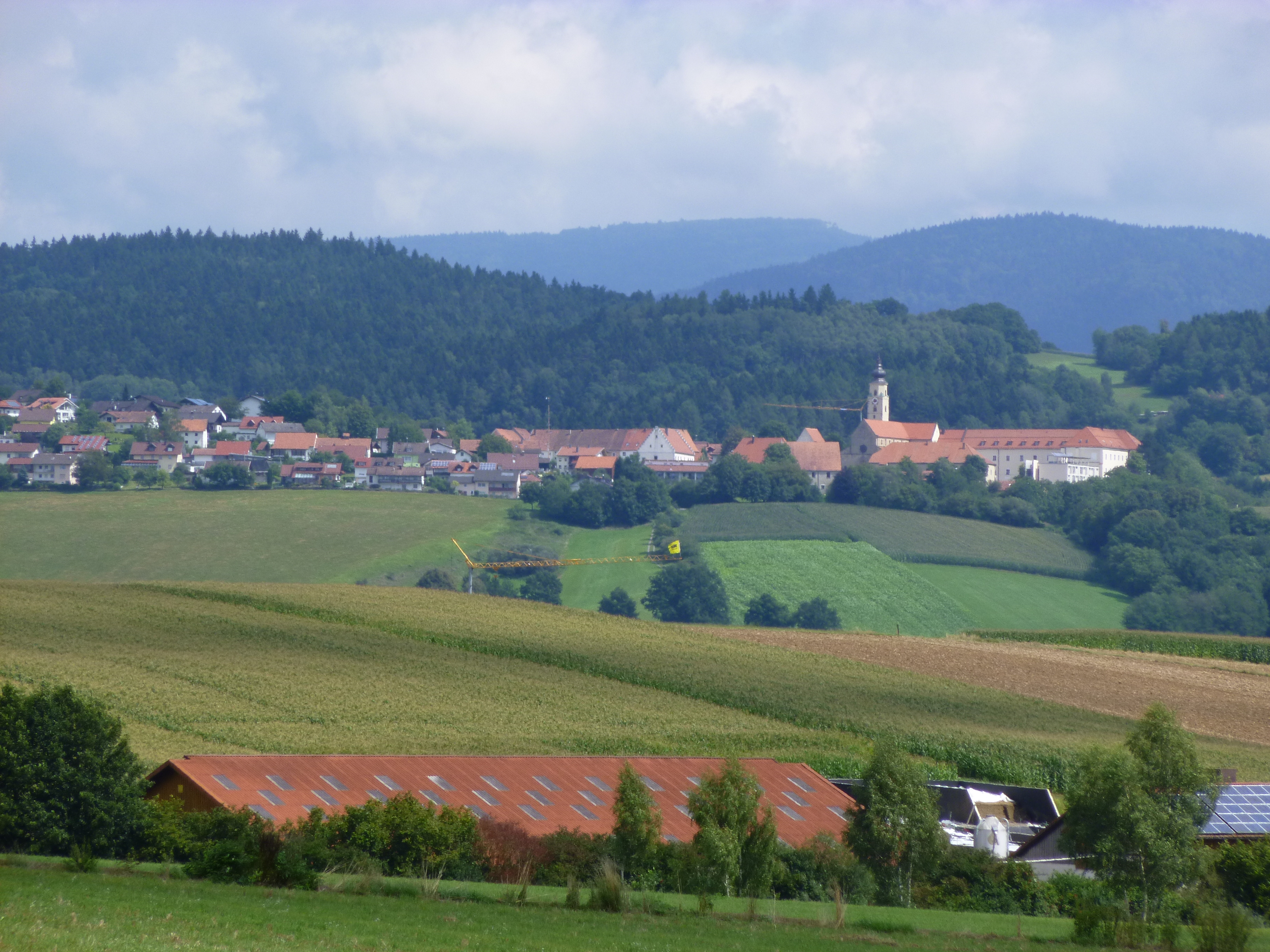 Blick von Stetten bei Hunderdorf auf das Klosterdorf Windberg im Landkreis Straubing-Bogen, Niederbayern. Im Hintergrund der Hirschenstein.